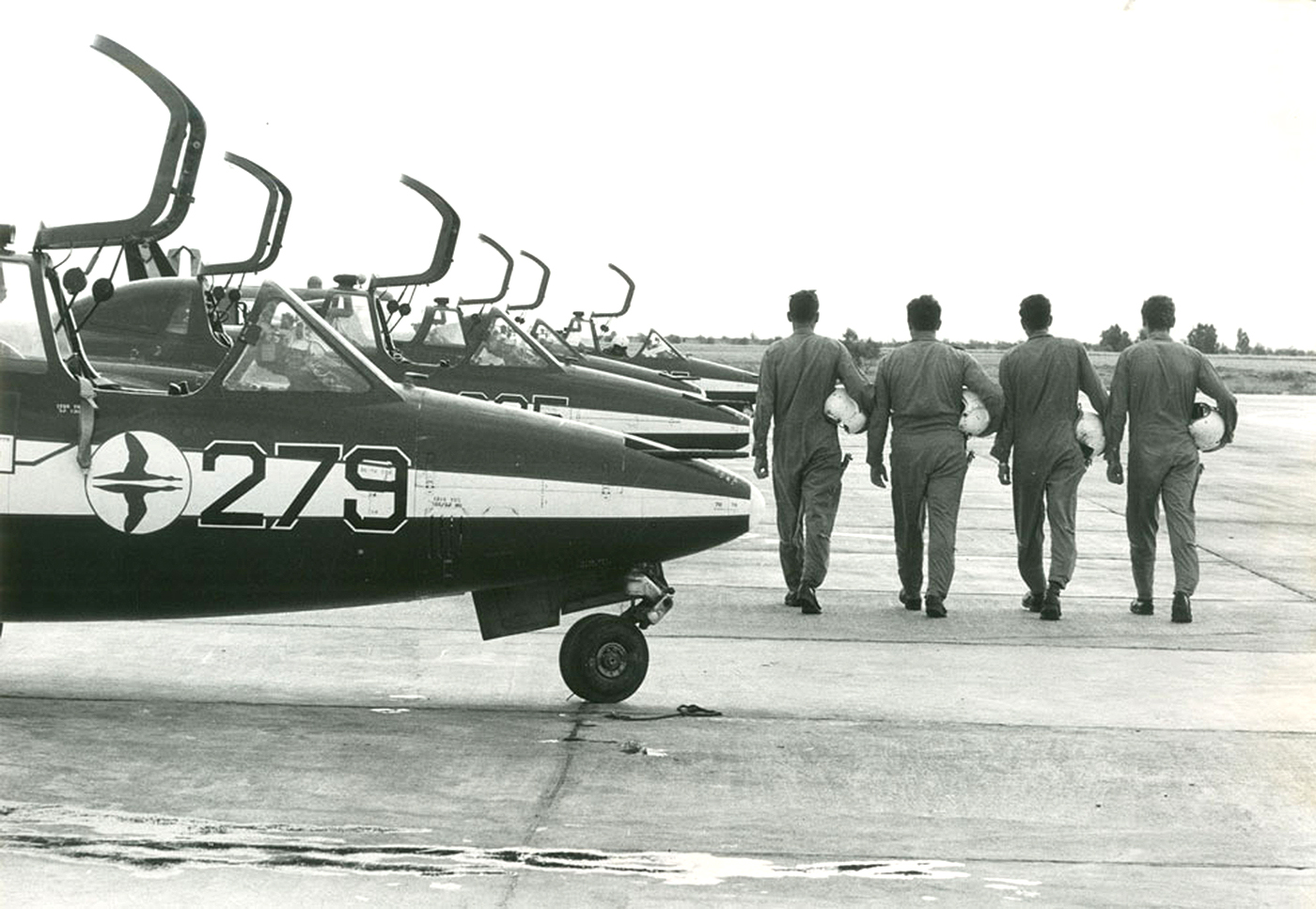 הצוות האווירובטי של חיל האוויר בבסיס חצרים.